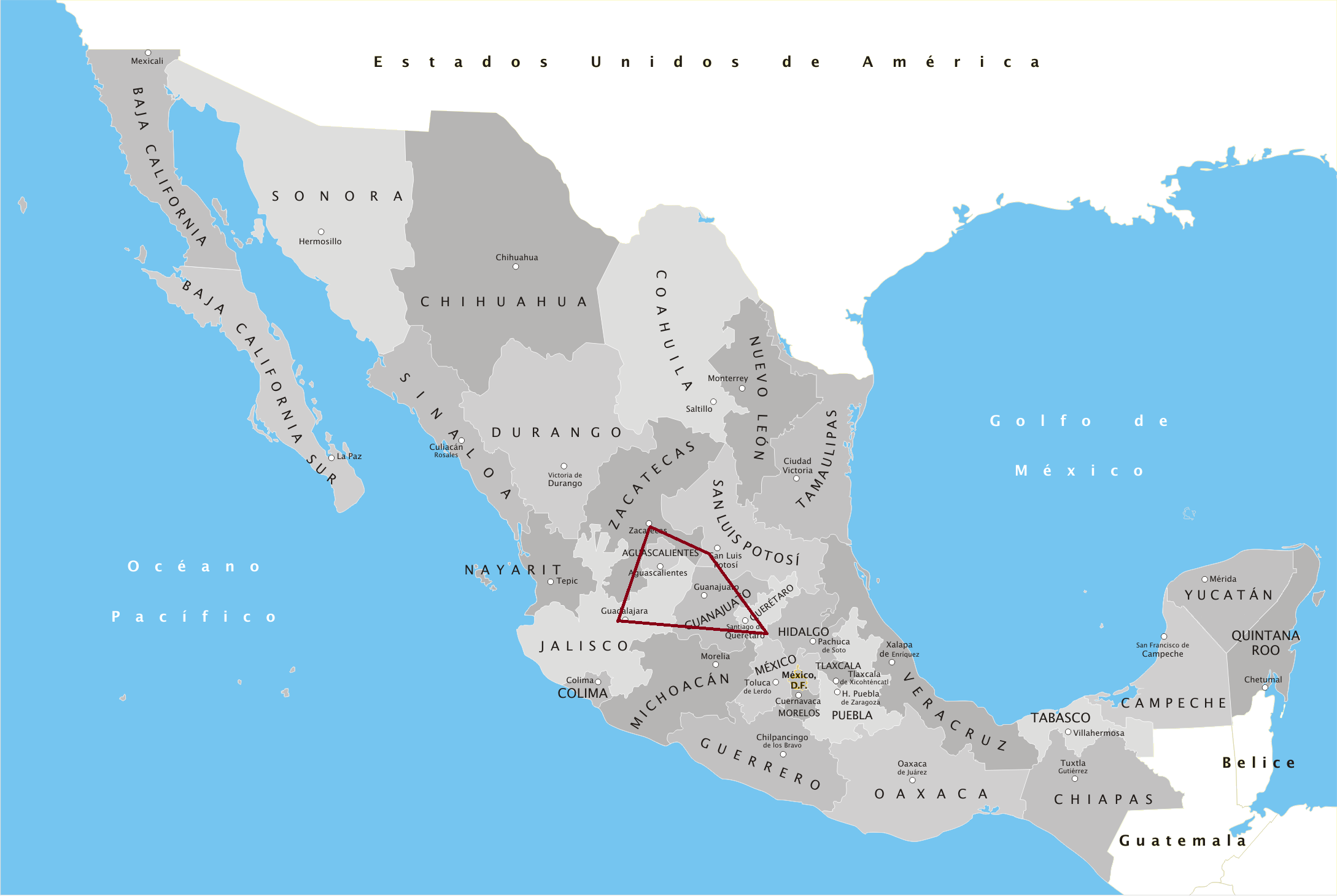 Ubicación aproximada del Bajío